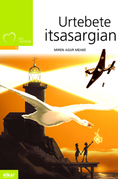 Urtebete itsasargian